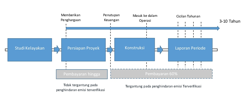 Scedule penerimaan Dana Inovasi Uni Eropa